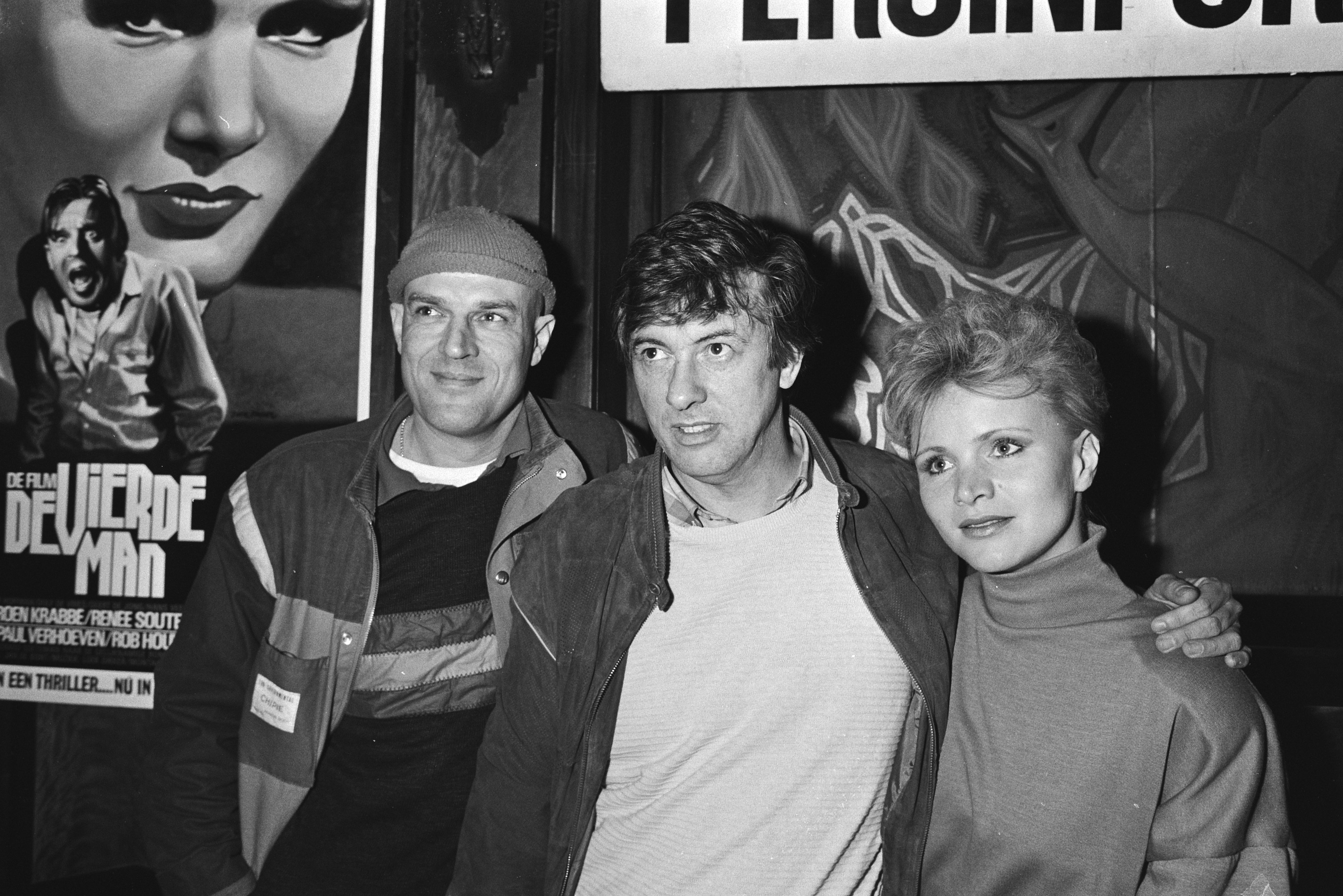 Collectie / Archief : Fotocollectie Anefo Reportage / Serie : Persvoorstelling van de Nederlandse film "De vierde man" Beschrijving : V.l.n.r. Jeroen Krabbé, regisseur Paul Verhoeven en Renée Soutendijk Annotatie : 'De vierde man' is een boek van Gerard Reve Datum : 23 maart 1983 Trefwoorden : acteurs, actrices, groepsportretten, public relations, regisseurs, speelfilms Persoonsnaam : Krabbé, Jeroen, Soutendijk, Renée, Verhoeven, Paul Fotograaf : Croes, Rob C. / Anefo Auteursrechthebbende : Nationaal Archief Materiaalsoort : Negatief (zwart/wit) Nummer archiefinventaris : bekijk toegang 2.24.01.05 Bestanddeelnummer : 932-5420